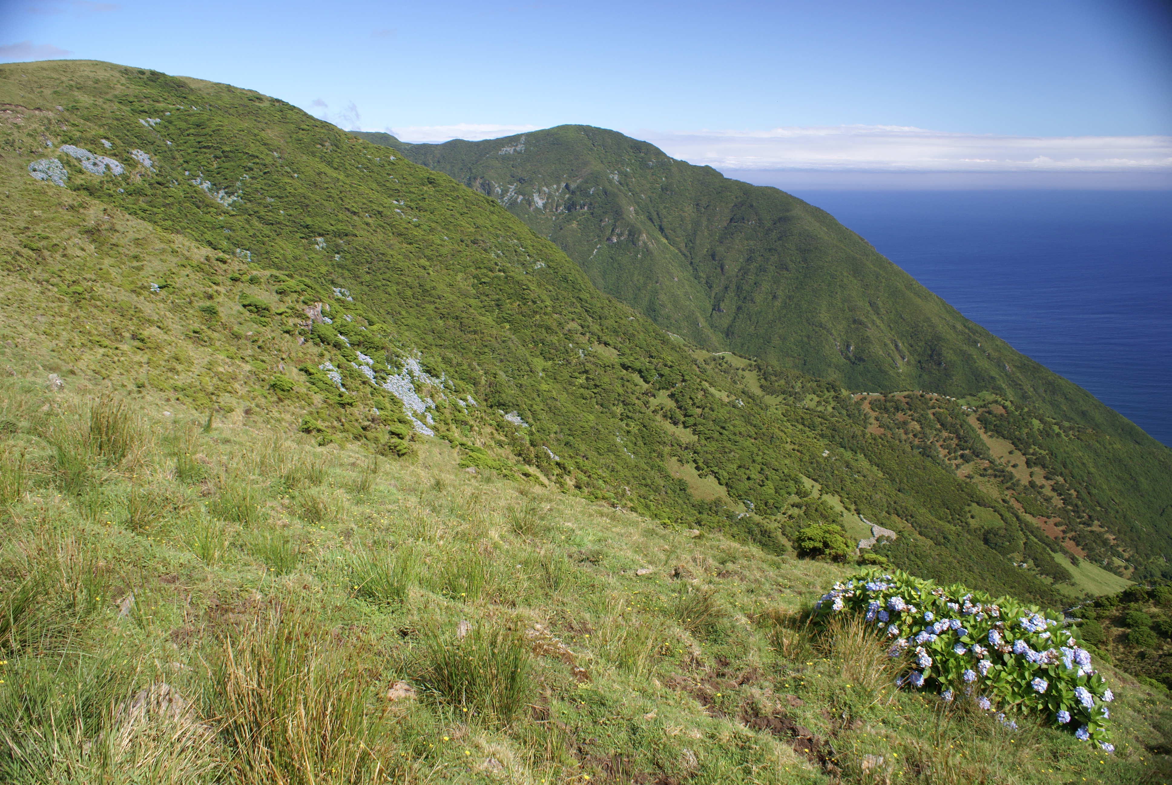 Caminho pedestre da Serra do Topo para a Fajã de Santo Cristo, vista 1, Calheta, ilha de São Jorge, Açores